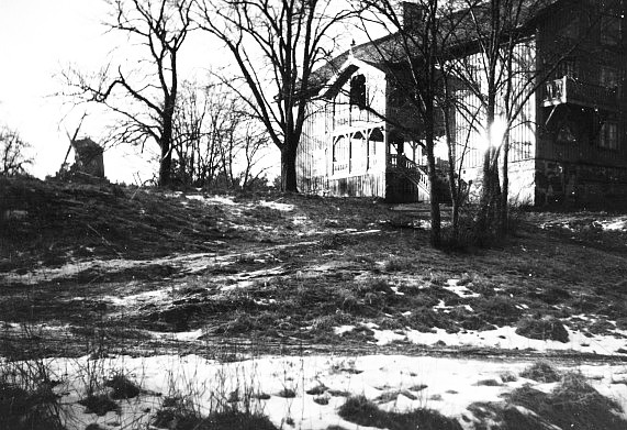 Boo gårds kvarn och Boo gård till höger